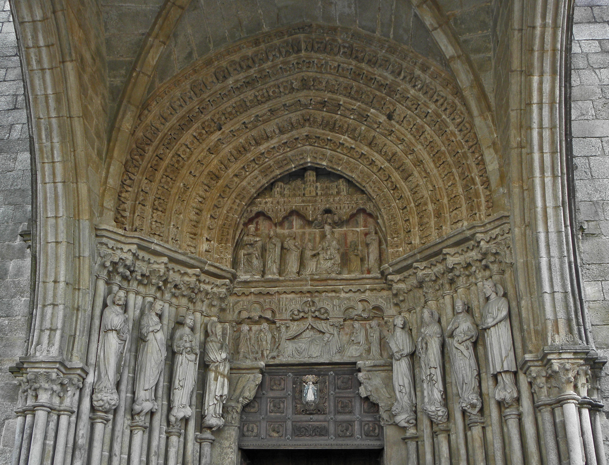 Portada Catedral Tui, Pontevedra